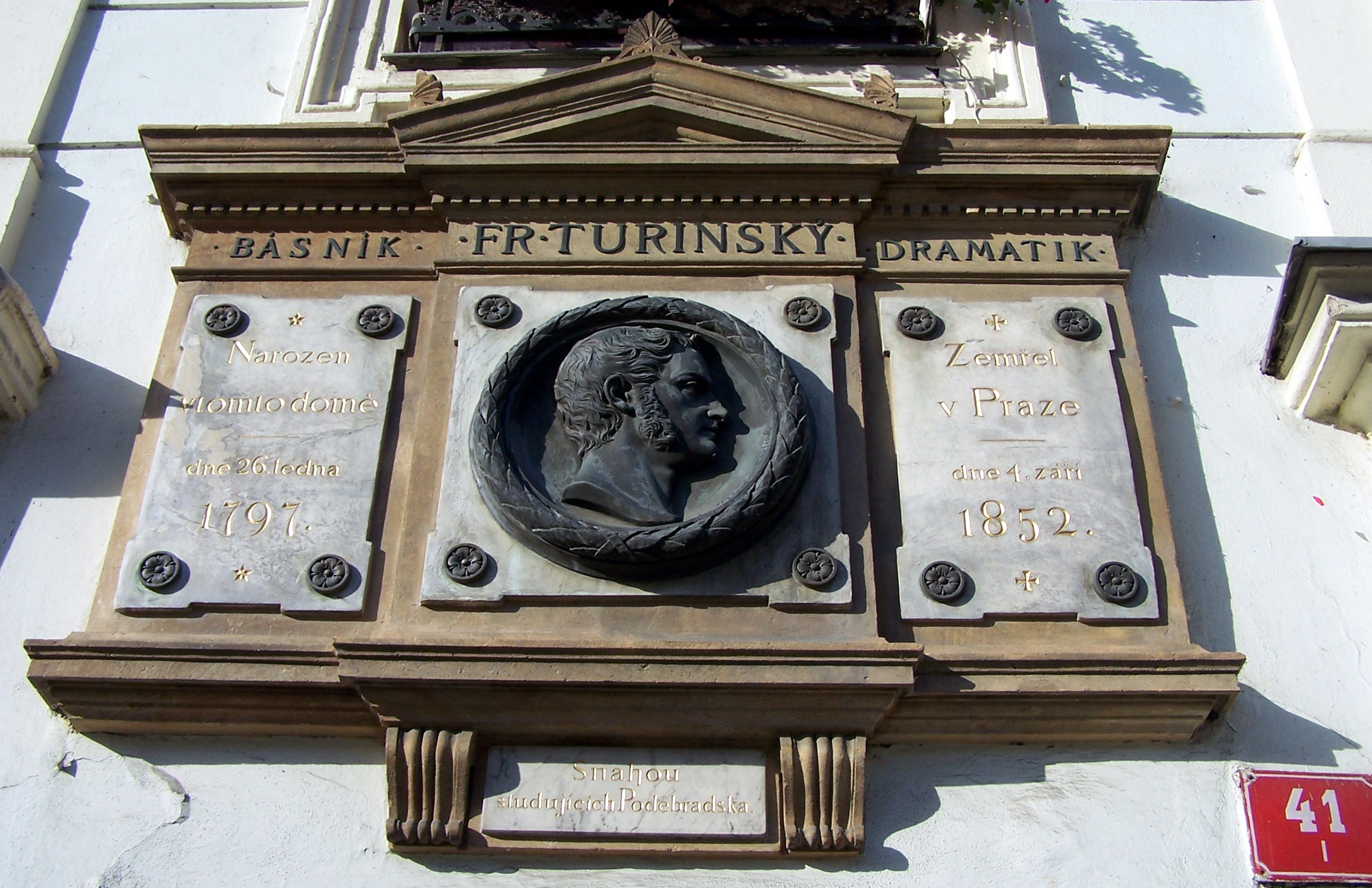 Pamětní deska Františka Turinského, autor je Bohuslav Schnirch. Deska je na budově staré radnice v Poděbradech, dnešní Městské knihovně.